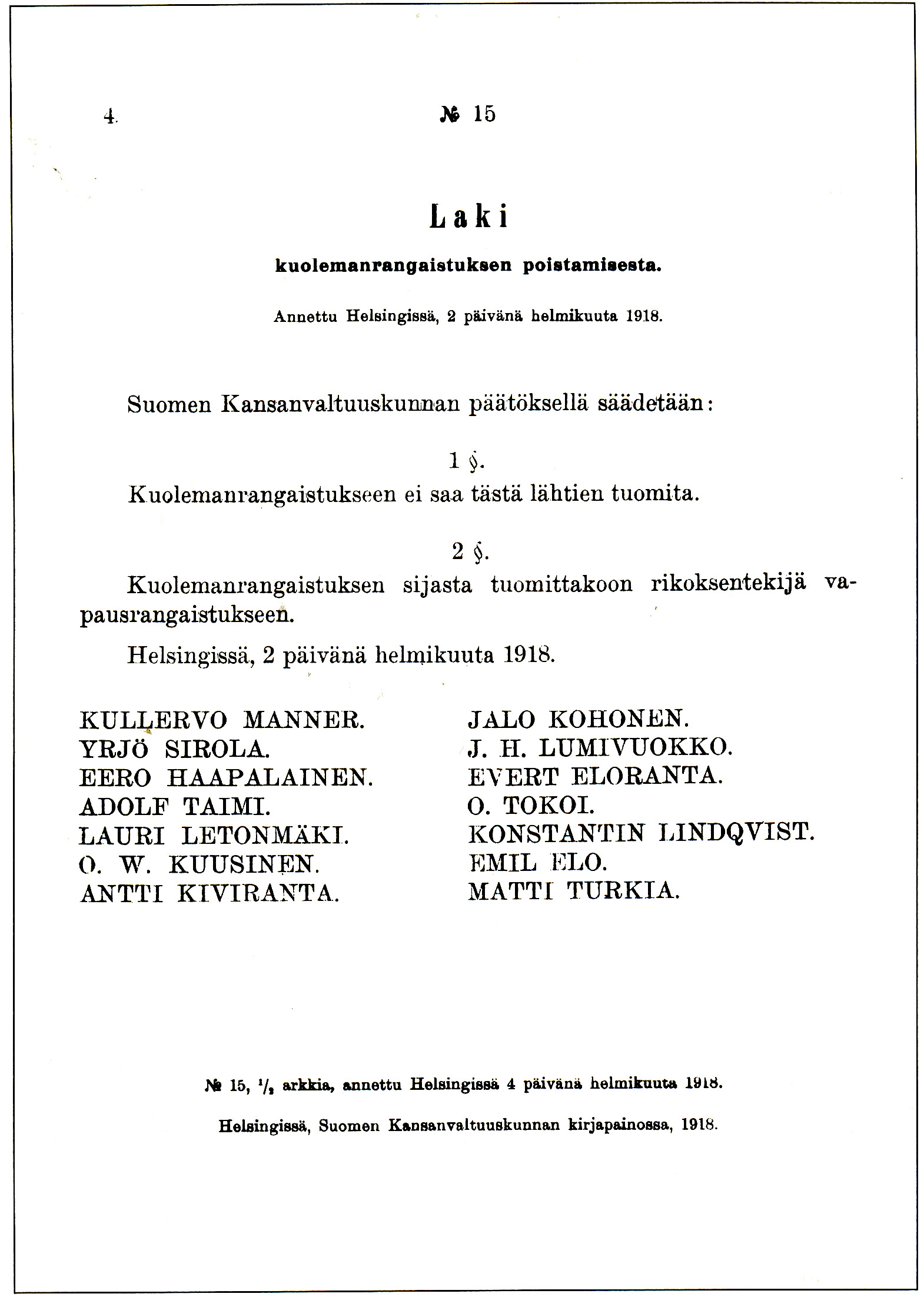 Suomen kansanvaltuuskunnan 2.2.1918 antama laki kuolemanrangaistuksen lakkauttamisesta.